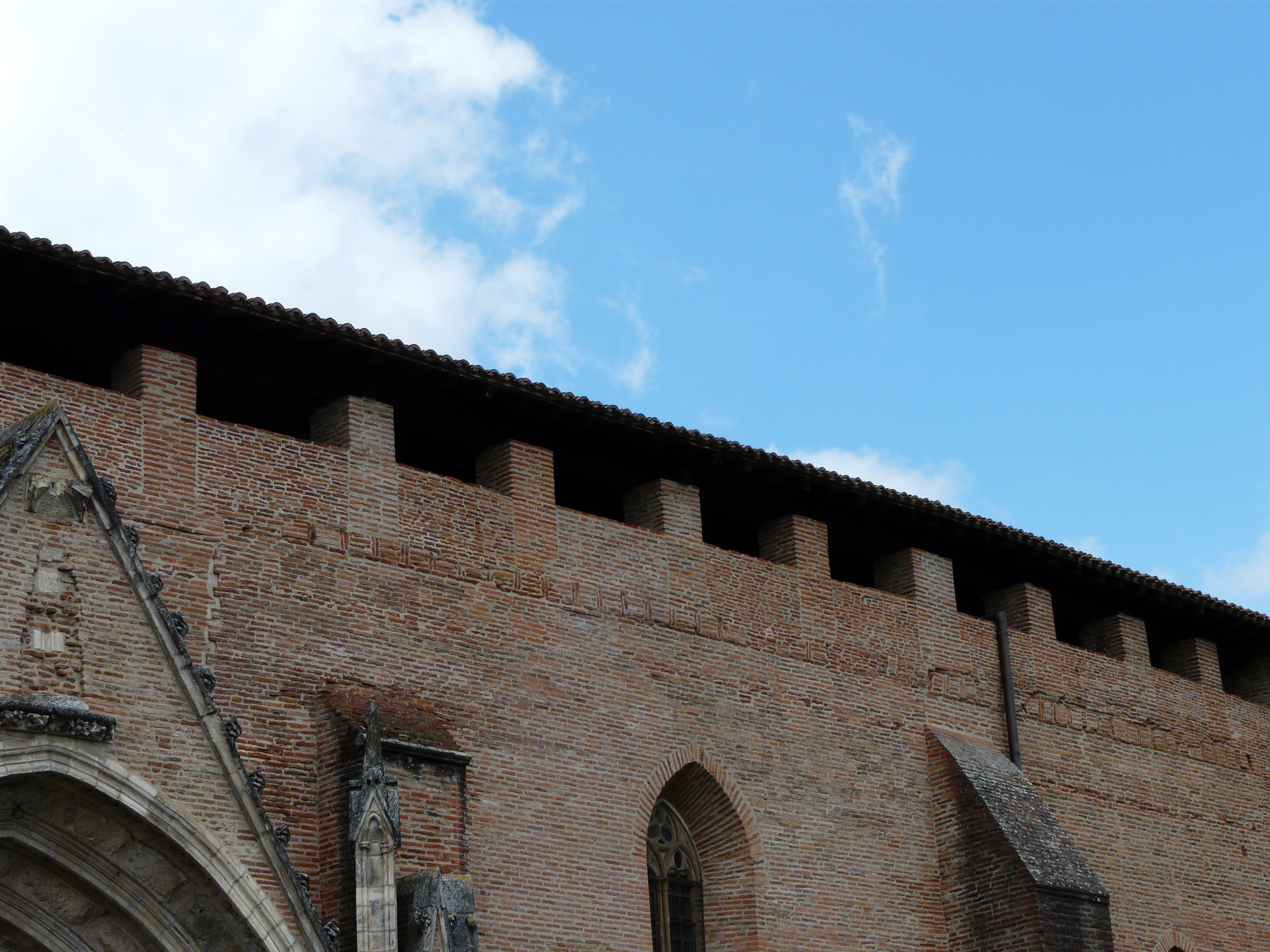 Chemin de ronde de l'ancienne cathédrale de Rieux, Haute-Garonne, France.